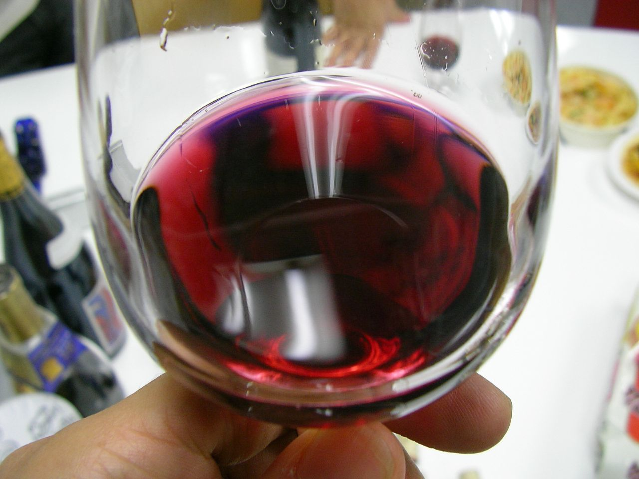 A glass of Beaujolais nouveau